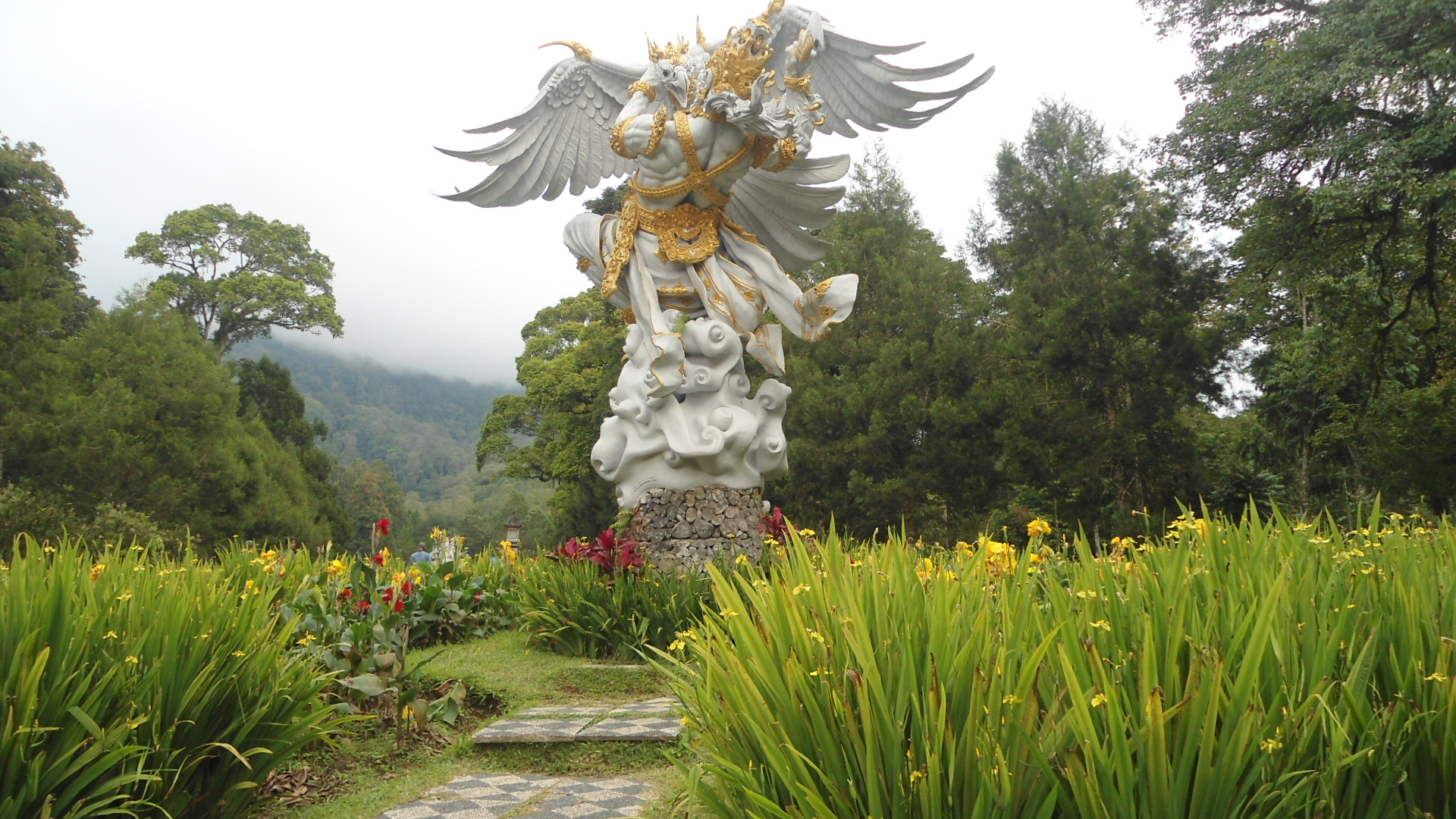 kebun raya eka karya Bali